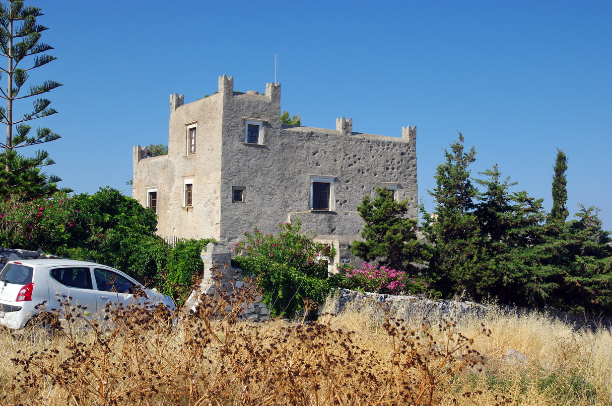 Pyrgos Belonia, Wohnturm bei Galanado